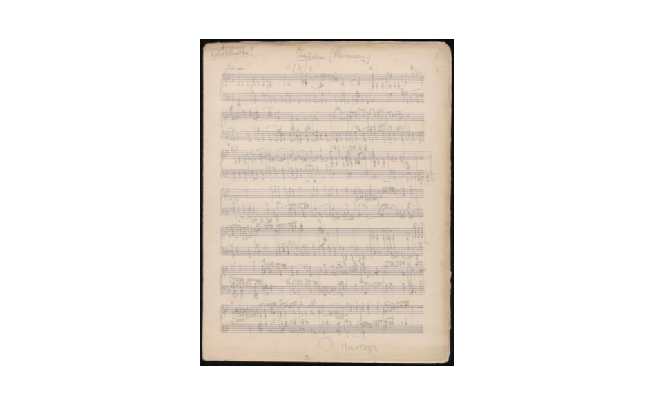 Rękopis muzyczny Sobótka: obrazek muzyczny Michała Mariana Biernackiego z ok. 1900 roku. Nuty. Muzyka na fortepian.